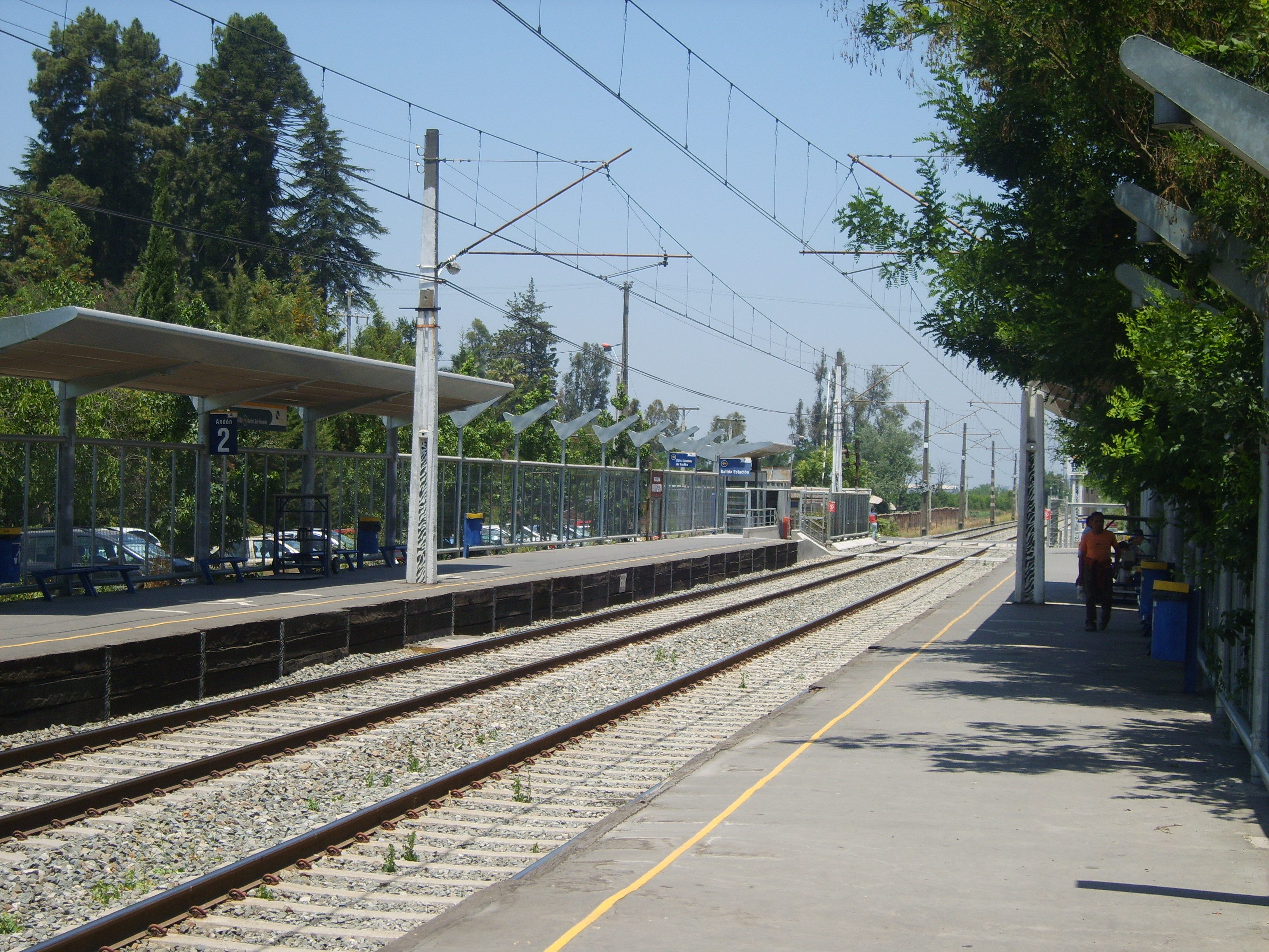 Estacion metrotren BuinZoo